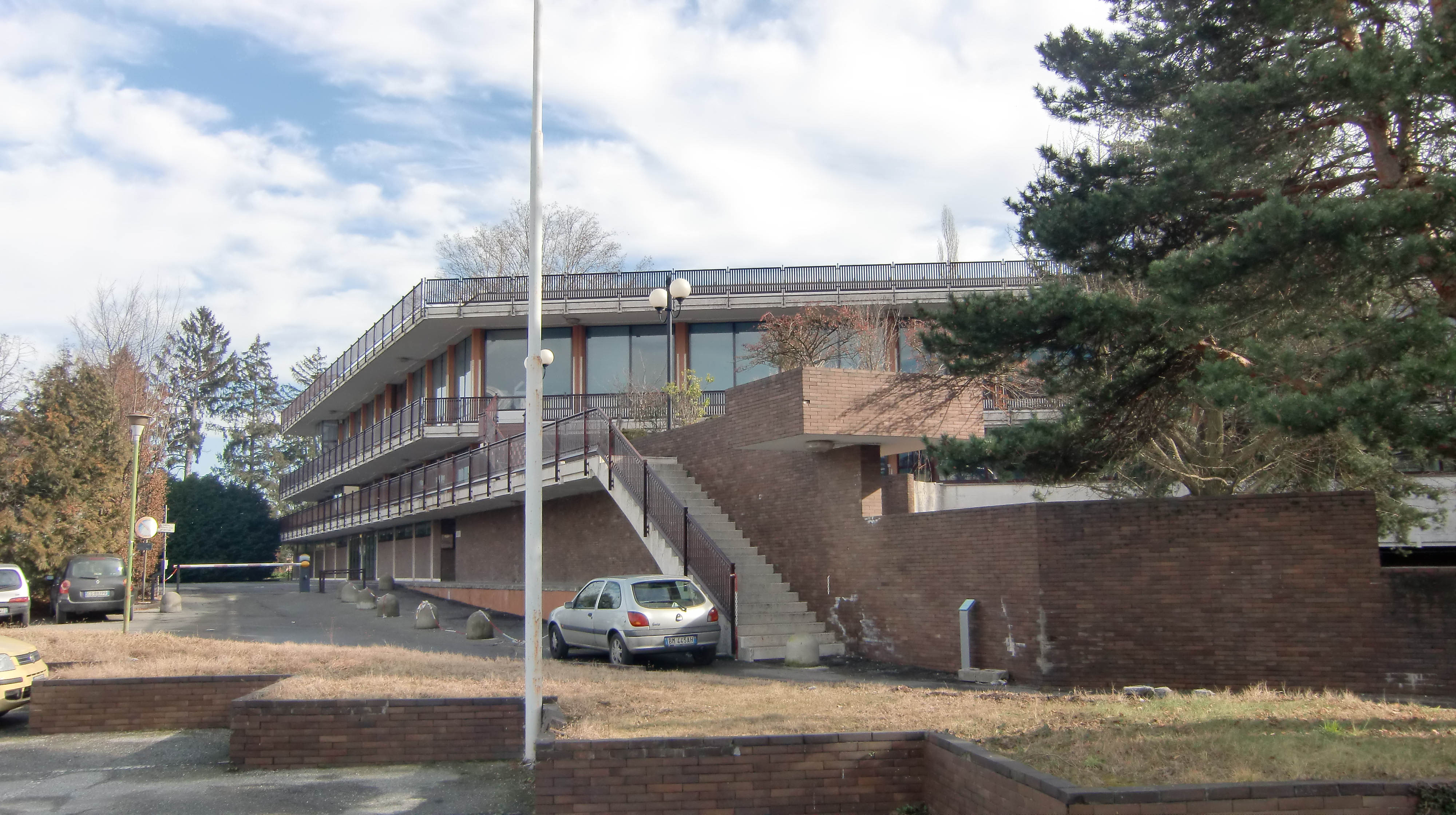 Ivrea, ex Mensa Olivetti progettata da Ignazio Gardella